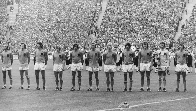 ADN-ZB-Mittelstädt-16.7.74-wen-München: X. Fußball-Weltmeisterschaft- Endspiel BRD gegen Niederlande 2:1 am 7.7.74- Die Mannschaft der Niederlande vor Spielbeginn. Von rechts: Johannes Gruyff, Jan Jongbloed, Adrianus Haan, Robert Rensenbrink, Wilhelmus Rijsbergen, Johannes Rep, Wilhelmus Suurbier, Wilhelmus Jansen, Wilhelmus van Hanegem, Ruud Krol und Johannes Neeskens.